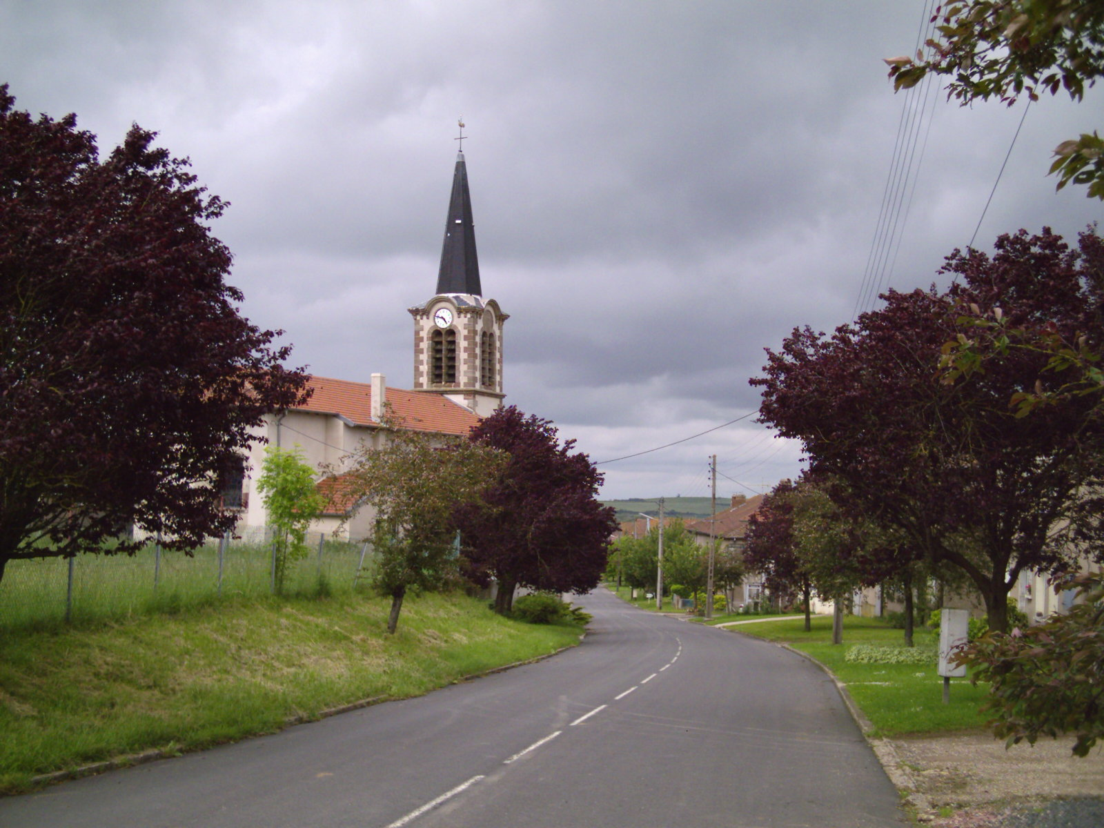 Xanrey 57 - France